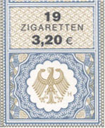 Deutsches Tabaksteuerzeichen. Das gummierte Zeichen, das auf Spezialpapier mit Sicherheitsmerkmalen versehen ist und außerdem als Verschluß dient, wird zum Nachweis der geleisteten Versteuerung auf die Verpackung am Deckel des Behältnisses aufgeklebt und hat eine Sollbruchstelle zur Vermeidung einer Wiederverwendung sowie der nachträglichen Mehrung des Inhalts. Das Tabaksteuerzeichen deklariert das enthaltene steuerpflichtige Gut nebst dessen Anzahl, Verkaufspreis für Endverbraucher und die Währung des Preises (Wert). Das Zeichen führt den Bundesadler, da es sich um eine Bundessteuer handelt. Hersteller ist die Bundesdruckerei.